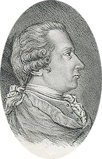 Per Abraham Örnsköld (1720-1791)